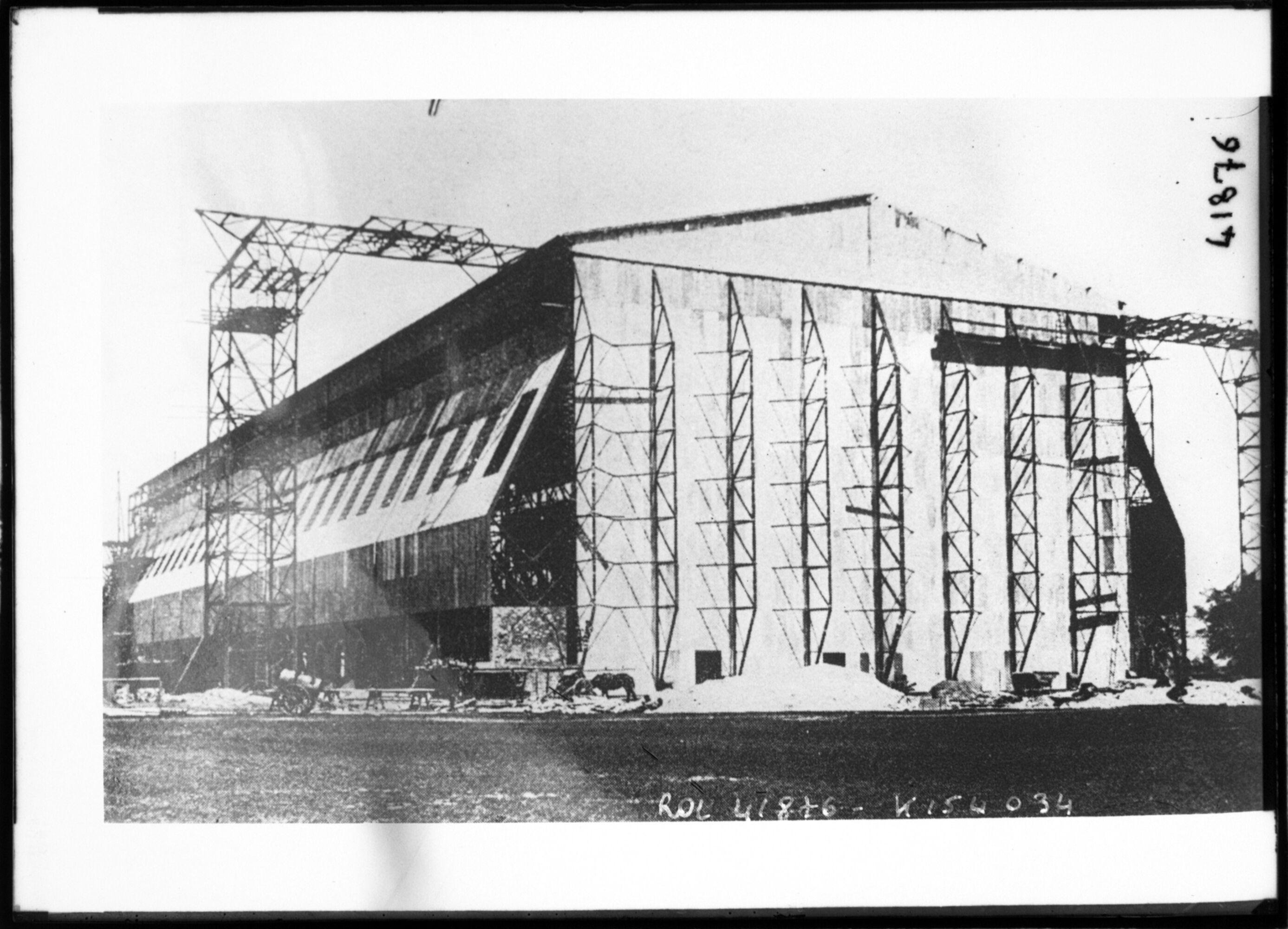 A Metz, hangar de zeppelin détruit par l'aviateur français Césari : photographie de presse